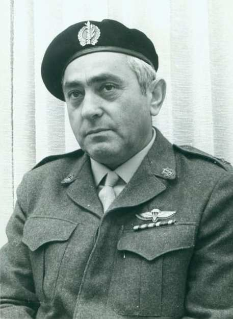 Depicted person: Yitzhak Pundak – Israeli diplomat